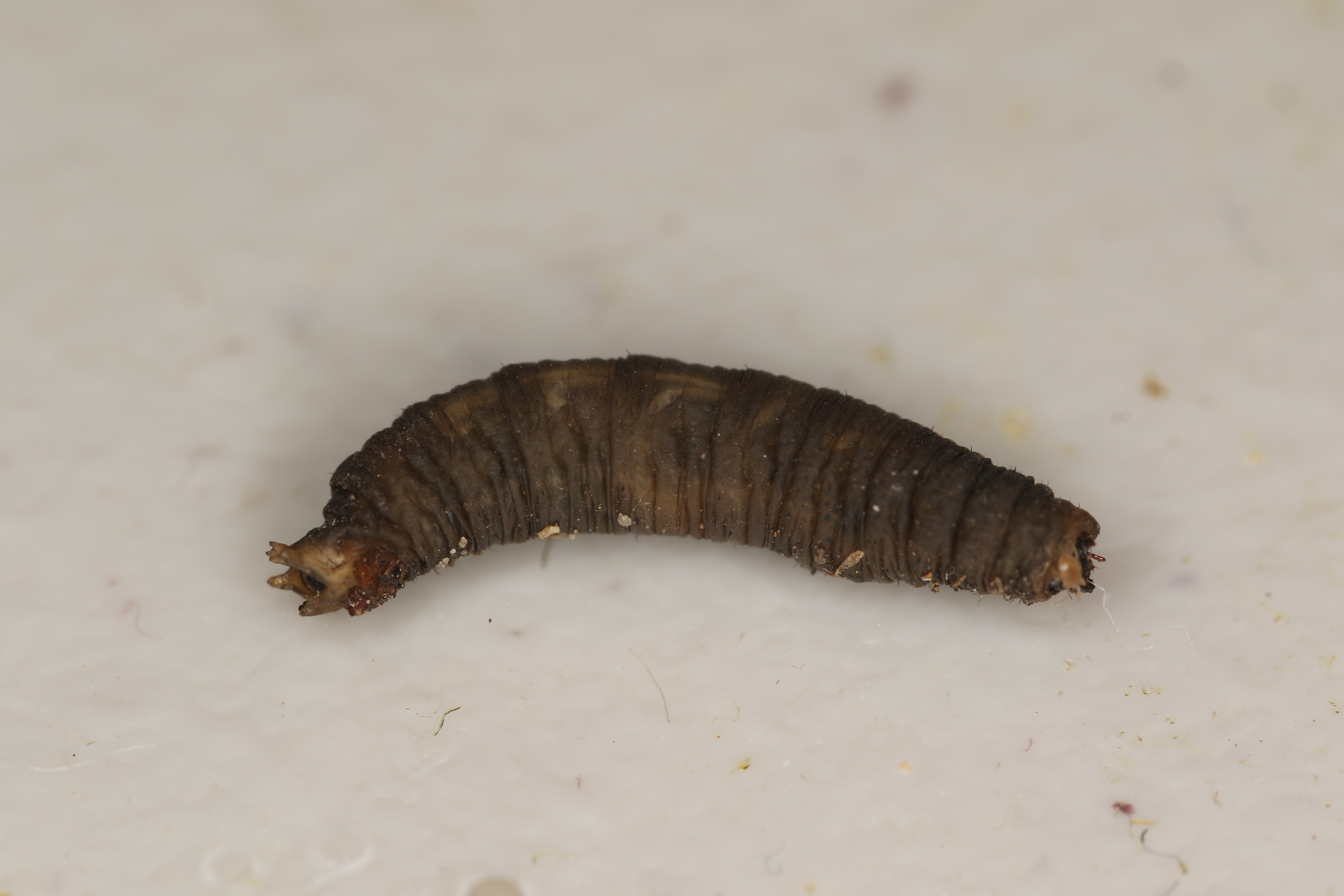 Tipulidae sp., larva, sieved from leaf litter using Moczarski apparatus, Søborg, Denmark, 29 April 2016